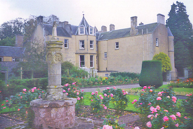 Myres Castle garden